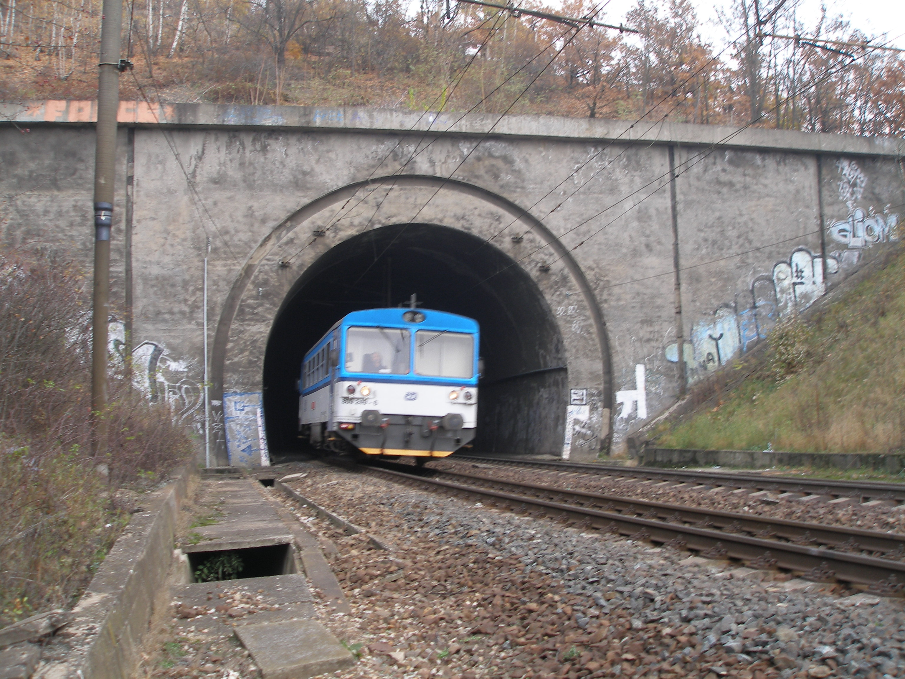 Jihozápadní portál železničního tunela pod Bílou skálou s vyjíždějícím motorovým vozem.